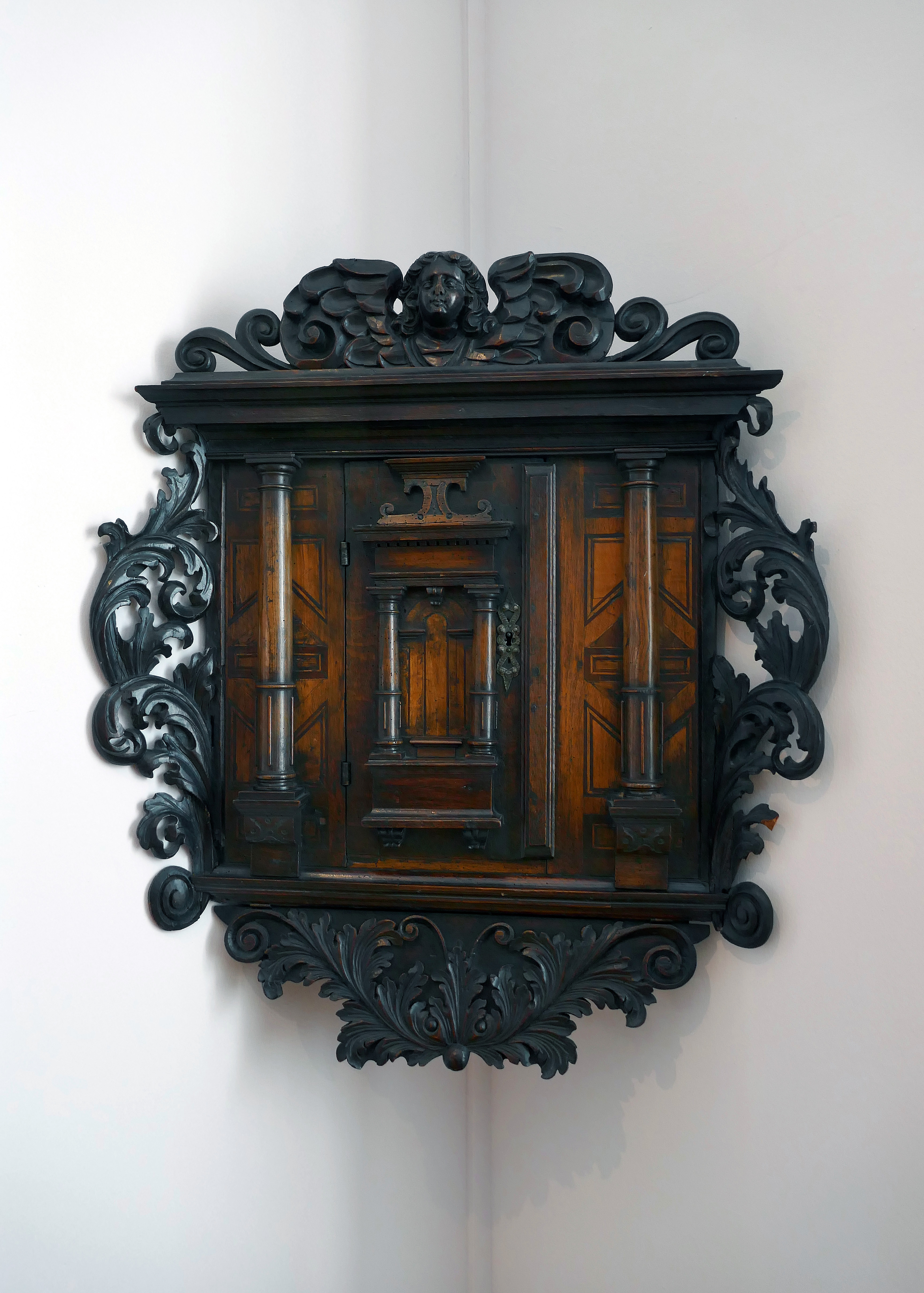 Encoignure marquetée avec jouées à décor de volutes d'acanthe Alsace, fin du XVIIe siècle Résineux, noyer, frêne, fruitiers Musée de l'Œuvre Notre-Dame de Strasbourg. N° 22.998.0.697